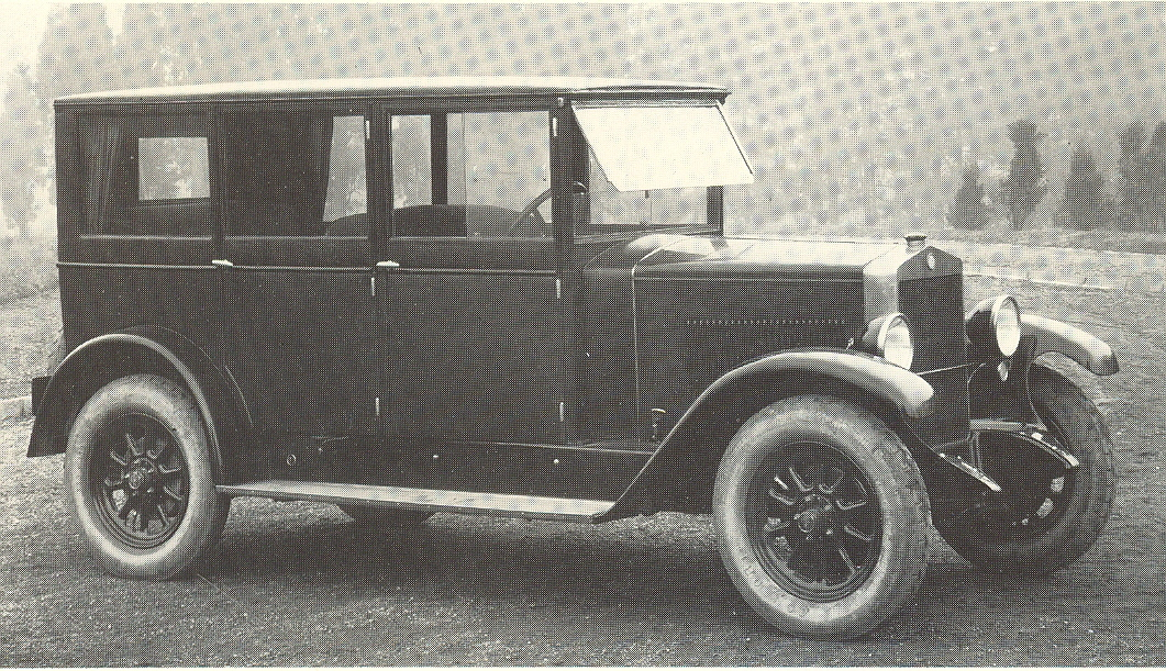 Fiat 503 Weymann (1926)